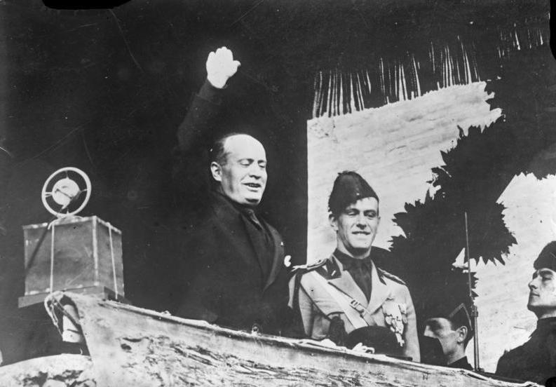 Mussolini spricht über die Unhaltbarkeit der Reparationszahlungen! Mussolini während seiner bedeutungsvollen Rede vor 50.000 Faszisten [Faschisten] in Rom.